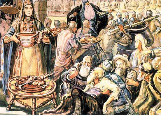 Картина М. Туганова "Пир Шатаны"